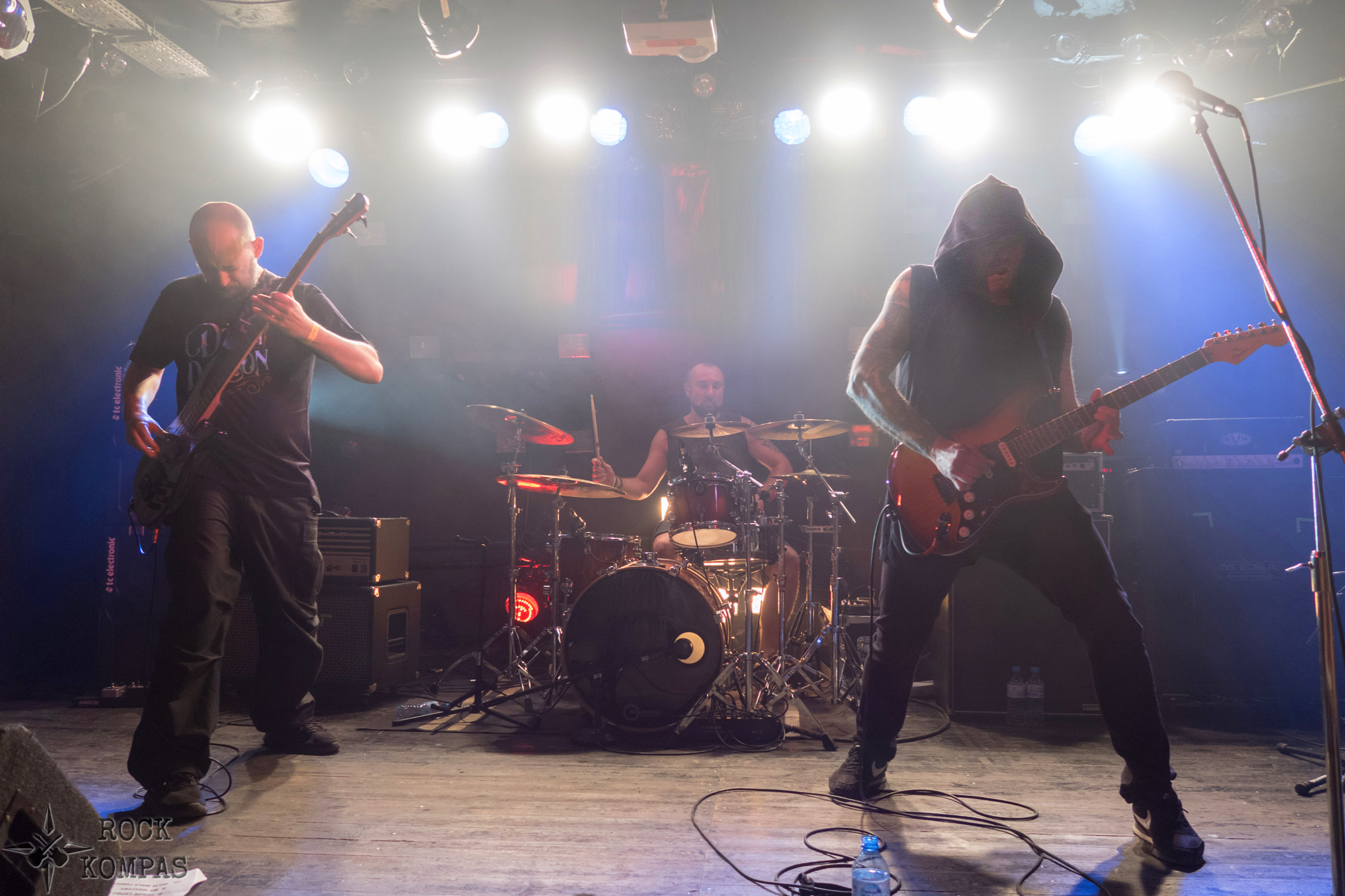 2019 Warszawa, klub Voo Doo